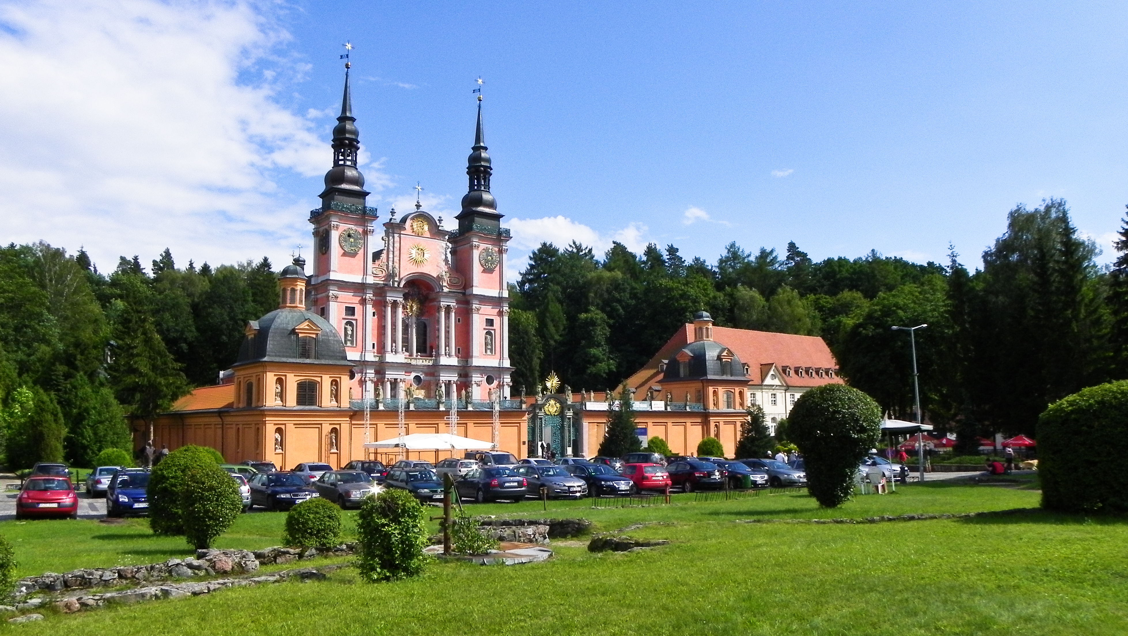 Bazylika Nawiedzenia Najświętszej Maryi Panny w Świętej Lipce.